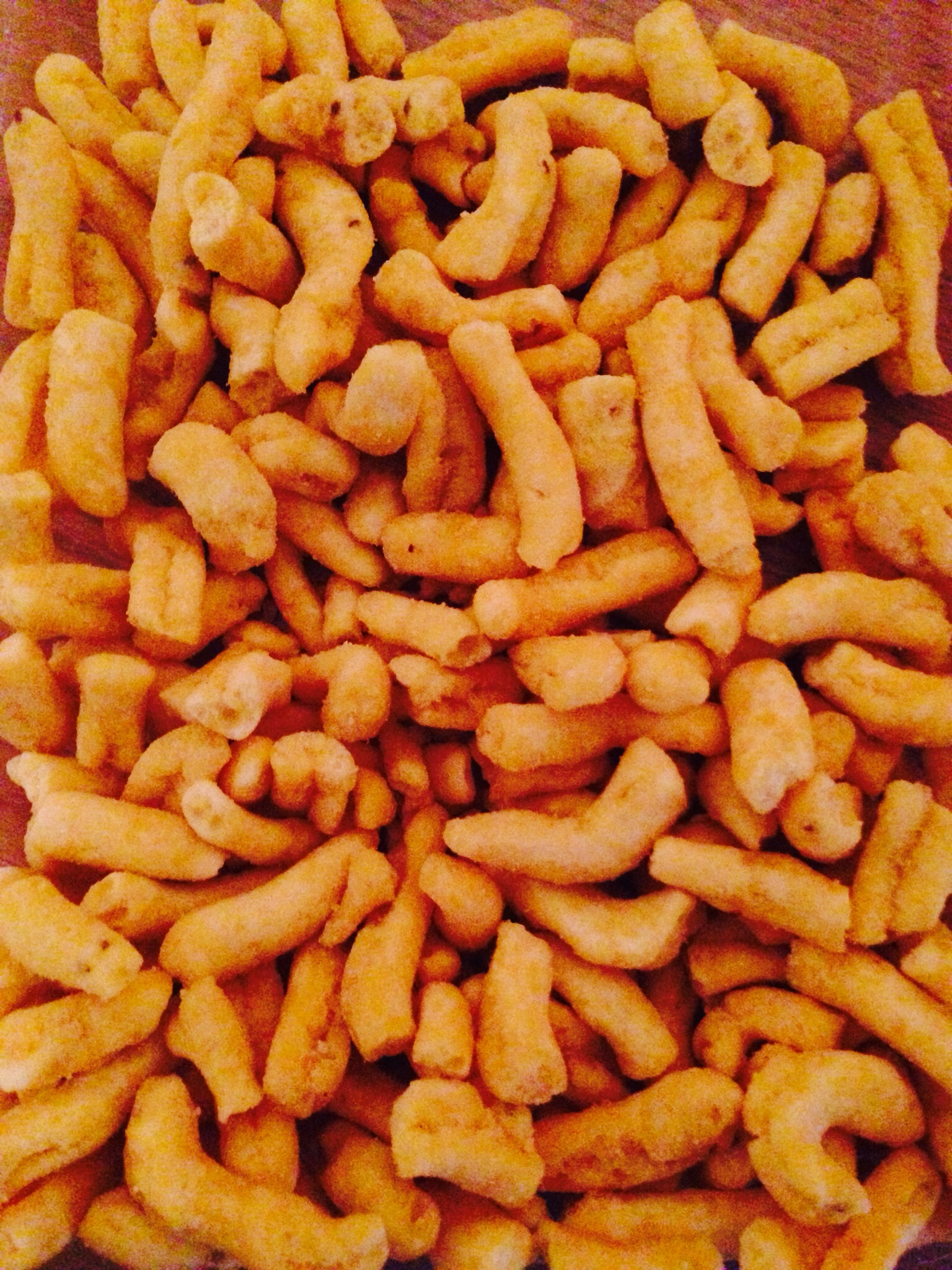 Ghatiya